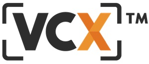 Valued Camera eXchange 의 약자로, 중립적 색상을 표방하는 주황색 및 오렌지 색으로 강조되어 있다.